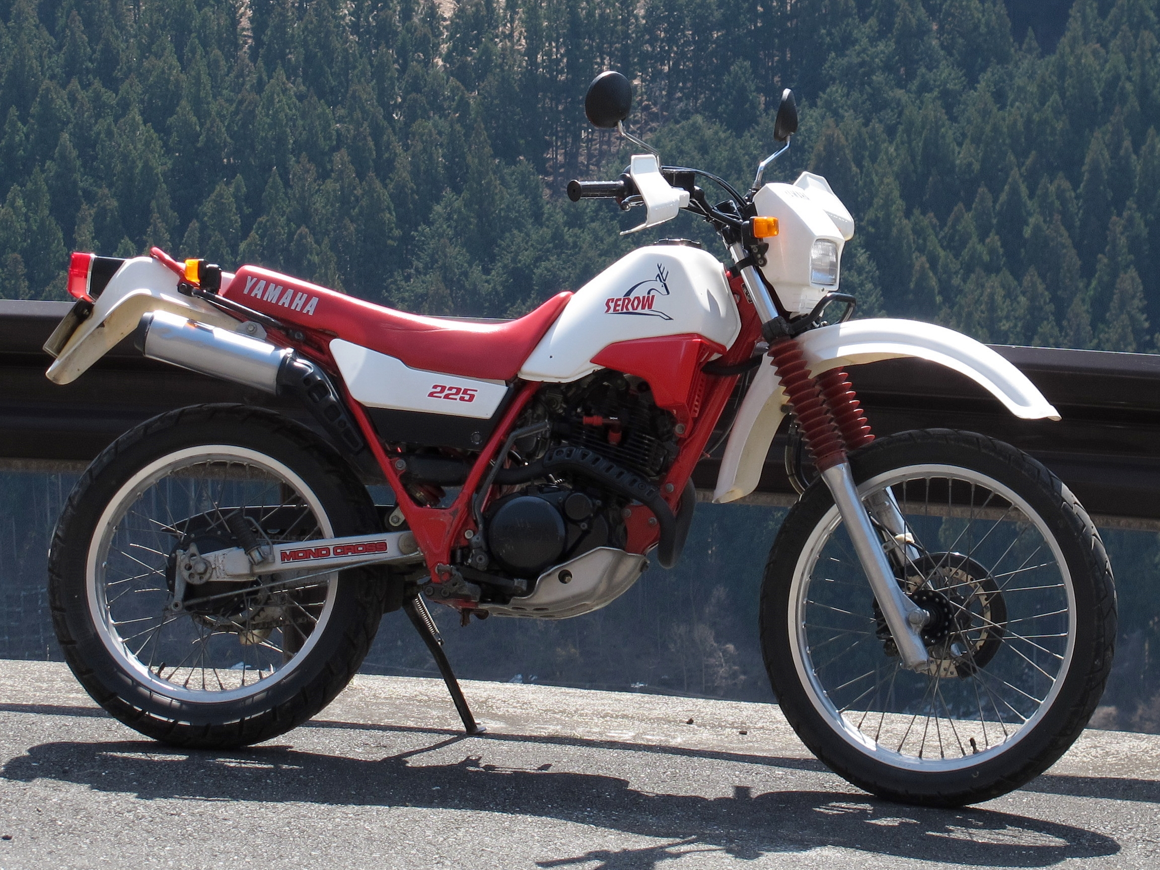 ヤマハ・セロー225(1KH)'1985年モデル、初期型。 YAMAHA XT225 SEROW(1KH)'1985 Japan